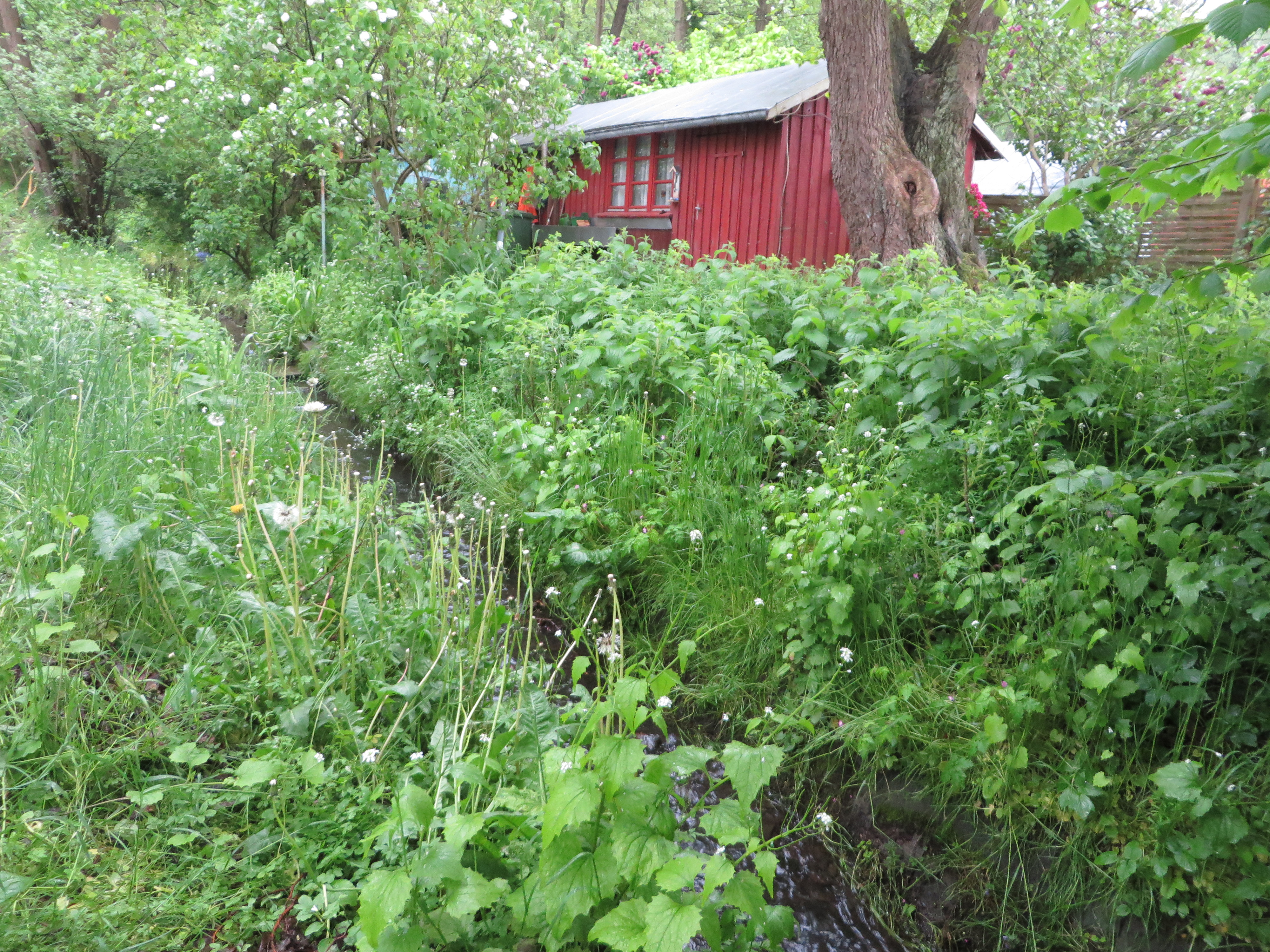 Bach der Cäcilienschlucht (bzw. Cecilienschlucht) beim Yacht-Hafen von Fahrensodde, Bild 01